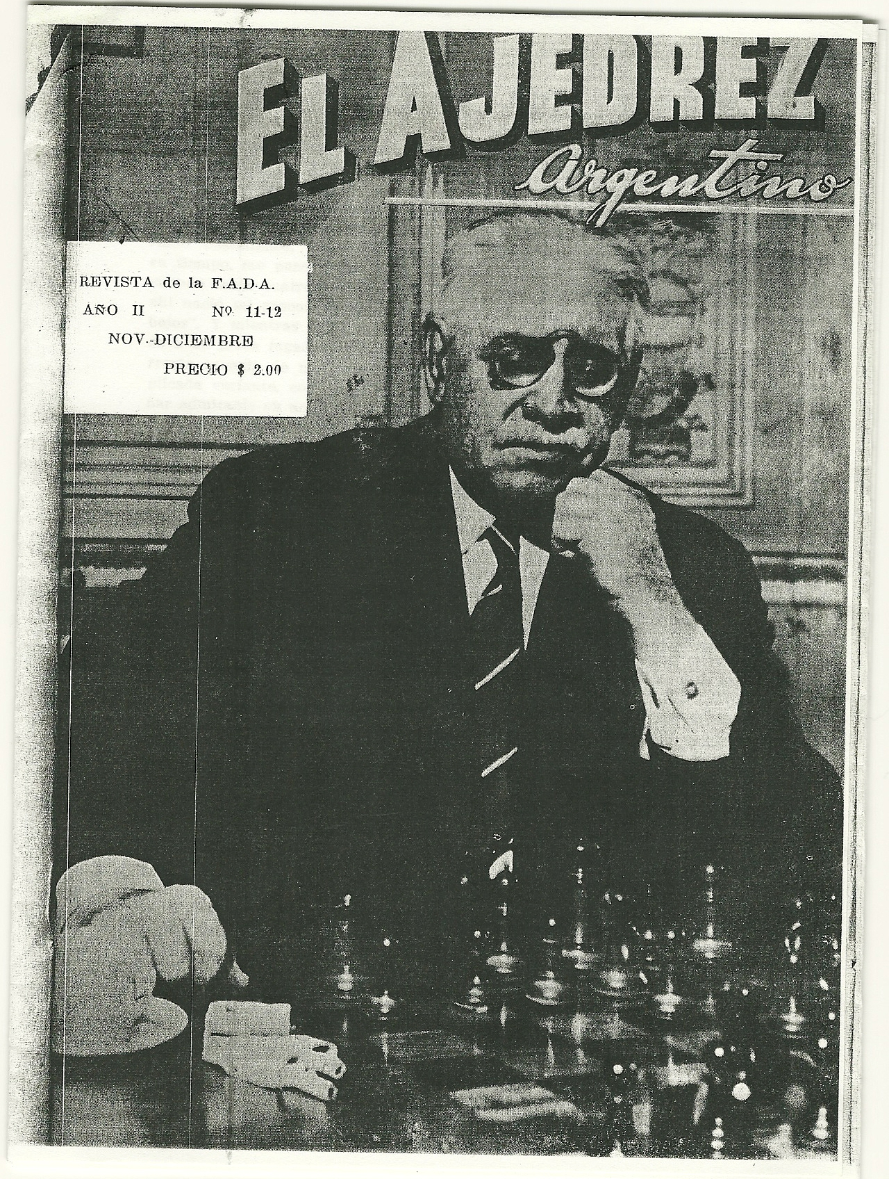 El maestro Benito Higinio Villegas nació en la ciudad de Buenos Aires el 11 de enero de 1877, y falleció el 27 de abril de 1952. Aprendió el ajedrez alrededor de sus cinco años de edad, de uno de sus tíos, Mariano Castellanos, conocido jugador de su época. Ganó su primer torneo en el Club del Progreso, a los veintitrés años, precediendo a renombrados jugadores, tales como el Dr. Julián Balbín, Cupertino del Campo, Eugenio Zamudio, Julio A. Lynch y otros. En 1905 es uno de los fundadores del Club Argentino de Ajedrez, ganando el campeonato de la entidad junto a Leopoldo Carranza y Lizardo Molina. Enfrentó exitosamente a los maestros europeos Richard Teichman y Jean Tabenhaus, quienes visitaron Buenos Aires contratados por el citado Club Argentino de Ajedrez. En 1911 enfrenta en partida individual al Campeón Mundial, Dr. Emanuel Lasker, también contratado por el Club Argentino de Ajedrez para dictar cátedra en su sede. La partida fue ganada por Lasker, quien emitió elogiosos comentarios sobre el juego del maestro Villegas. En 1912 iguala el primer puesto del campeonato del club, junto con Rolando Illia y Jorge Nollmann. En 1914 toma parte en el torneo campeonato el renombrado maestro europeo Boris Kostic, especialmente invitado, quien lo gana, clasificando segundo el maestro Villegas. En el Torneo Internacional jugado en la ciudad de Carrasco, Uruguay, en 1921-22, el maestro Villegas alcanza un consagratorio segundo puesto. Gana el título de Campeón Argentino en 1922, continuando en la competencia hasta el match radial Argentina – España, jugado en 1946. Merece destacarse que una de sus hijas contrajo matrimonio con el ajedrecista Jacobo Bolbochán, (1906-1965) otro de los maestros que conforman la vieja guardia del ajedrez argentino.